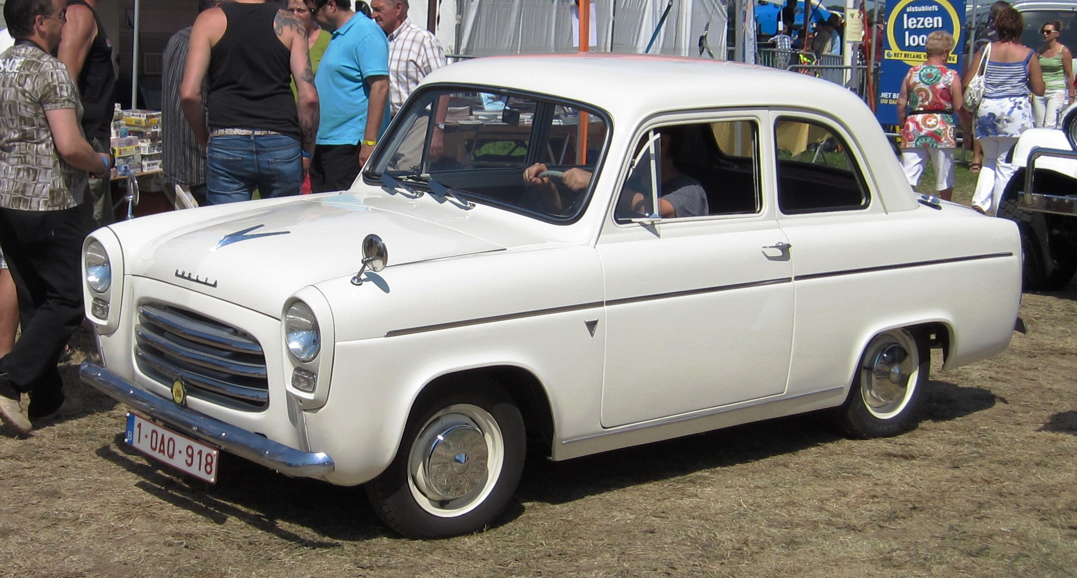 Ford Anglia 100E (1957)